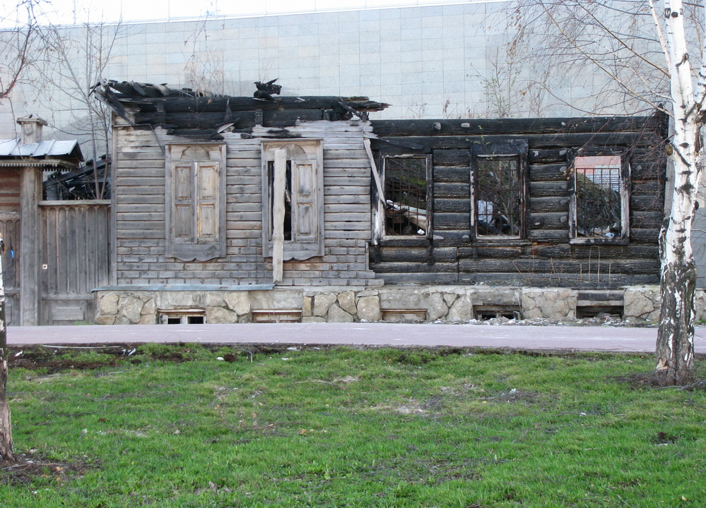 Дом в стиле русского классицизма, построенный в середине XIX века по проекту архитектора Карла Рейнгольдовича Турского. Располагался по адресу Набережная Рабочей Молодёжи (бывш. Тимофеевская), 24. В ноябре 2006 года был подожжён и частично уничтожен пожаром , в октябре 2014 года снесён. Фото апрель 2013 года.